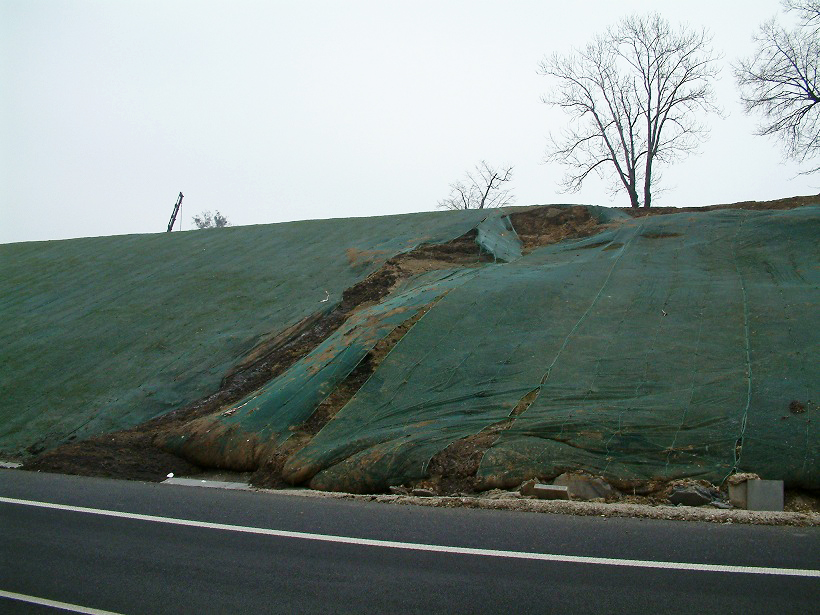 Wyraźny problem ze statecznością skarpy.